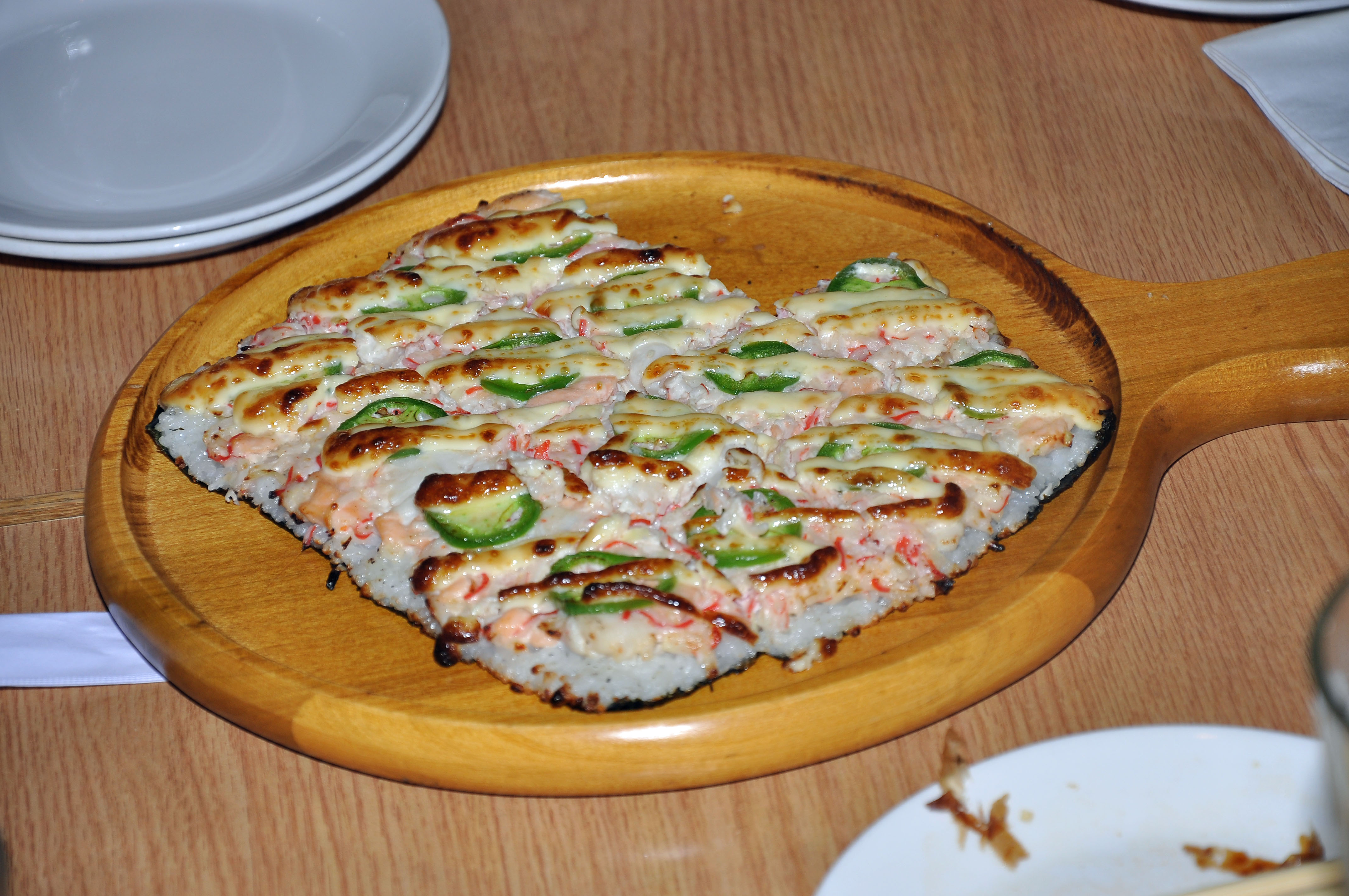 Sushi Pizza from Shokudo